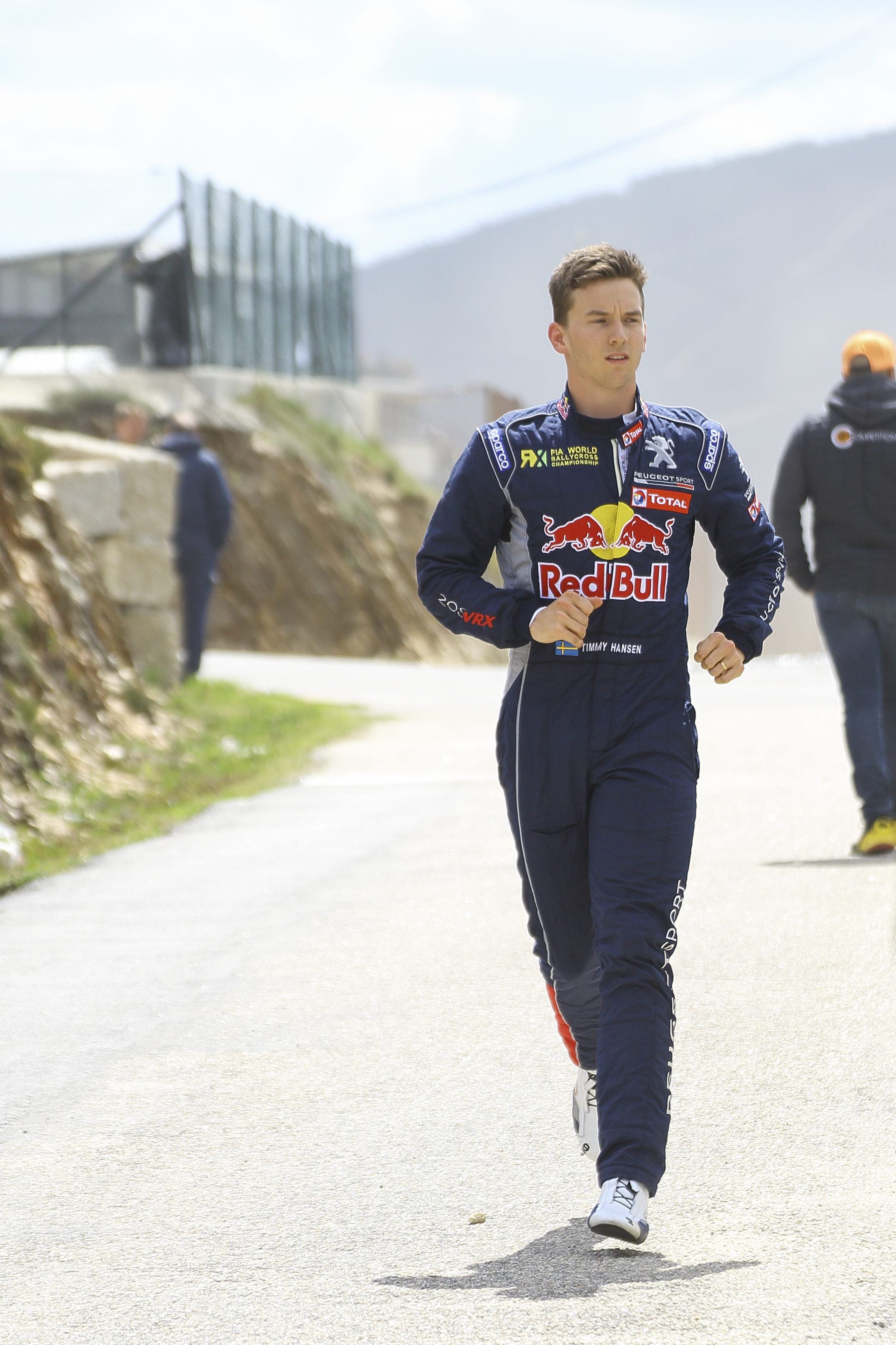 Johan Kristofferssonganó en la final en Portugal, tras hacerlo en España, el Sueco se afianza en el liderato provisional del Campeonato. Sin embargo no fue el mejor en las mangas de entrenamiento que fueron dominadas por Andreas Bakkerud.